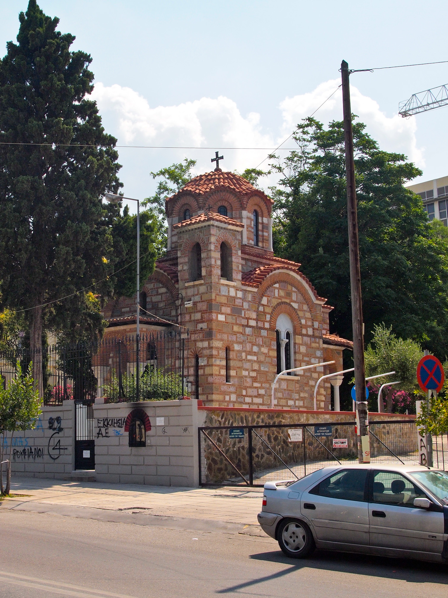 Ιερός Ναός Αγίου Στυλιανού